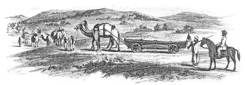 Painting from William Francis Lynch book The Narrative of the United States Expedition of the River Jordan and the Dead Sea. Published in 1849 ציורים מספרו של ויליאם פרנסיס לינץ' שחקר את הירדן וים המלח בשנת 1848. הספר פורסם בשנת 1849 ציור משלחתו של לינץ המעבירה את הסירות מעכו לטבריה.